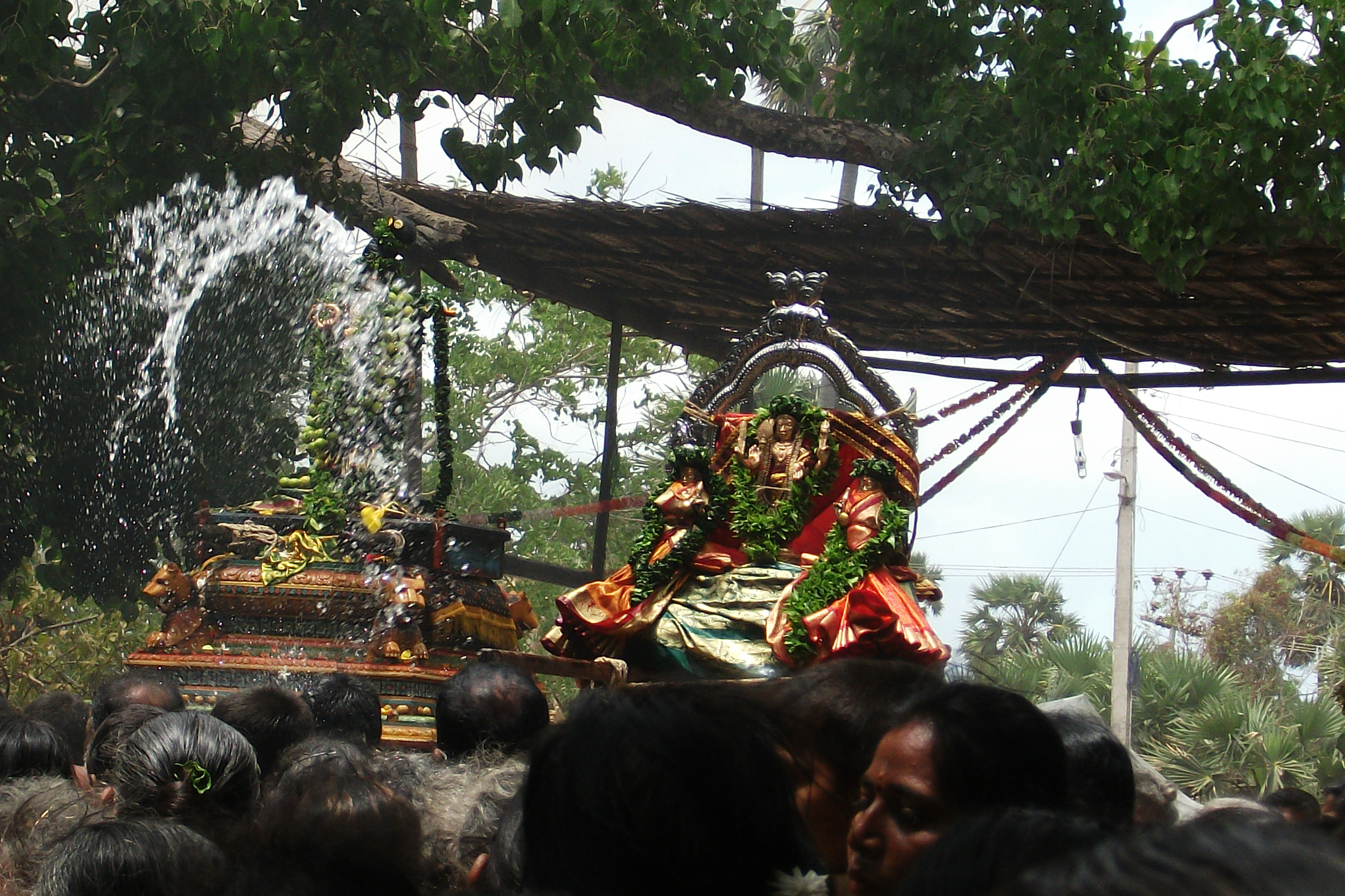 அம்பாளிற்கு பச்சை சாத்துதல் (தேர்த்திருவிழா)